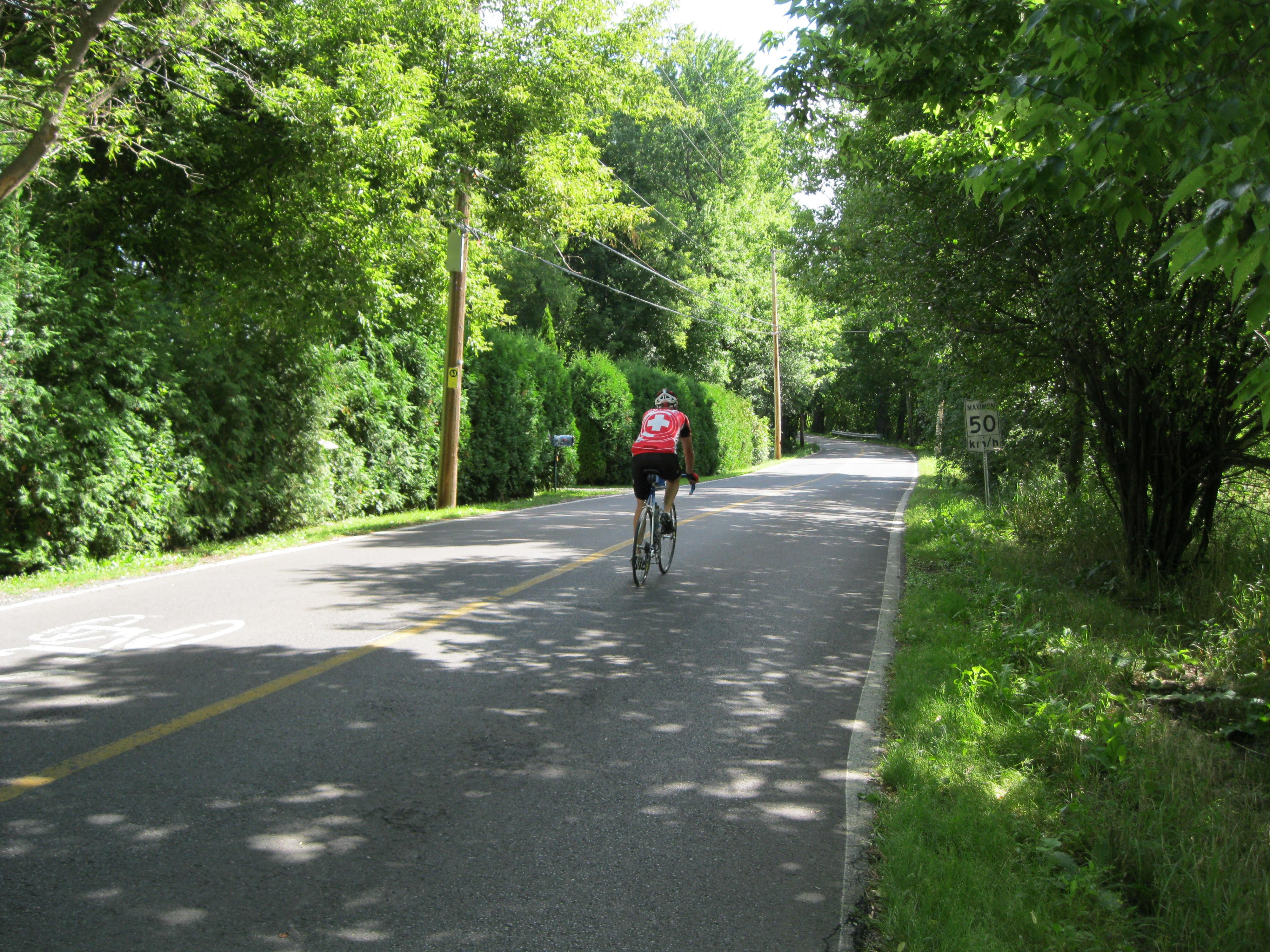 Le chemin de Senneville est une route pavée qui traverse la municipalité de Senneville dans l'ouest de l'île de Montréal. Un secteur de Senneville, qui correspond au parc agricole du Bois-de-la-Roche, fait partie de la ville de Montréal depuis 2002. Grand répertoire du patrimoine bâti de Montréal